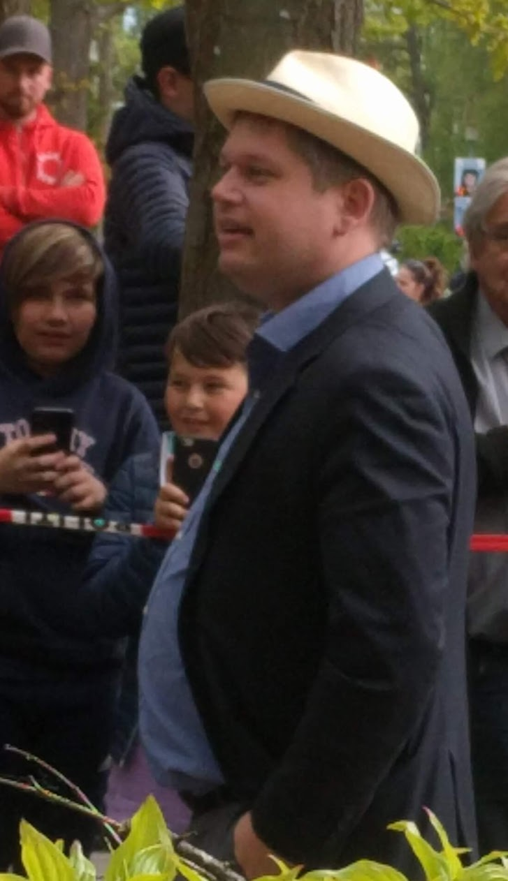 Rasmus Paludan besøger Frederiksværk gymnasium og HF, efter at rektor havde valgt at udelukke alle nyopstillede partier, fra at deltage i en debat.